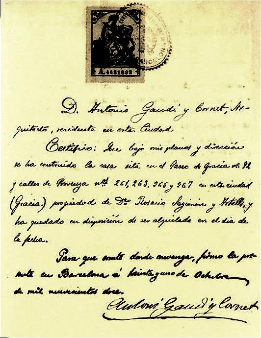 Certificado de finalización de las obras de la Casa Milà, autógrafo de Gaudí (1912).